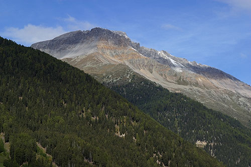 Piz Starlex von Müstair aus gesehen